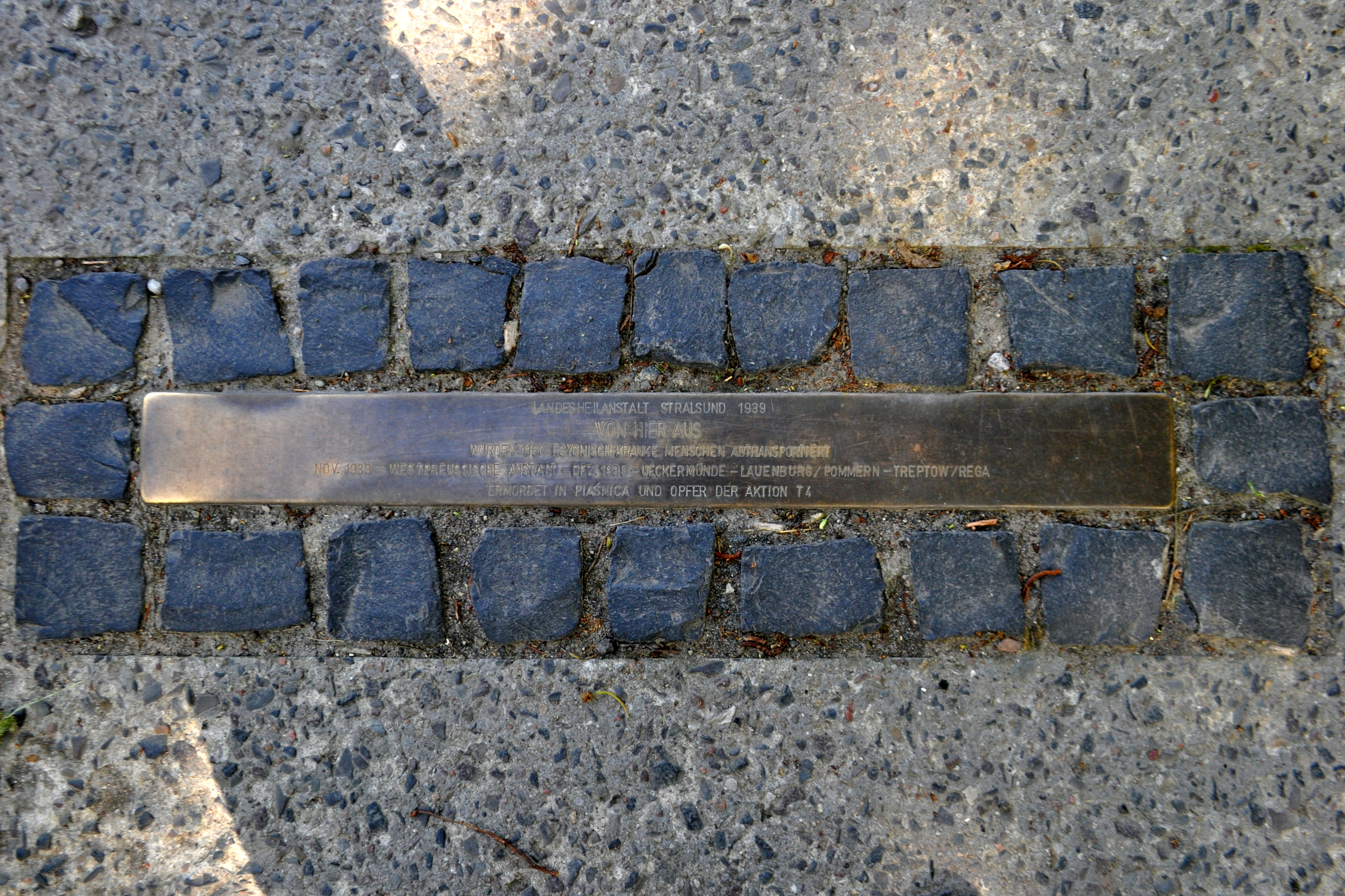 Stolperschwelle auf dem Gelände des HELIOS Klinikums Krankenhaus West in Stralsund, Rostocker Chaussee. Inschrift: "LANDESHEILANSTALT STRALSUND 1939 / VON HIER AUS / WURDEN 1160 PSYCHISCH KRANKE MENSCHEN ABTRANSPORTIERT / NOV. 1939 WESTPREUSSISCHE ANSTALT - DEZ. 1939 UECKERMÜNDE - LAUENBURG/POMMERN - TREPTOW/REGA / ERMORDET IN PLASNICA UND OPFER DER AKTION T4